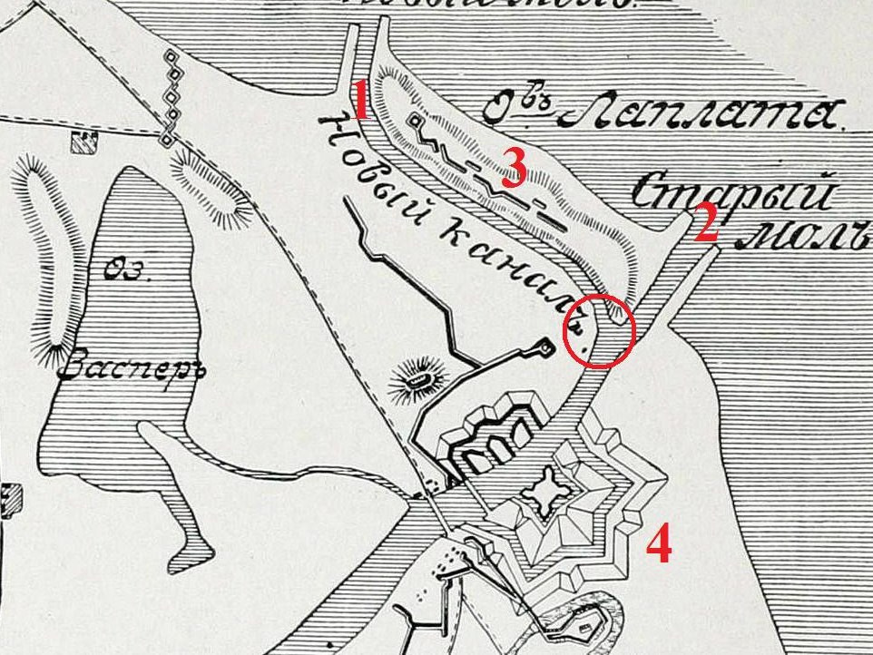 Plan Gdańska w 1734 r.: 1-Kanał Portowy, 2-stare ujście Wisły, 3-Westerplatte (jeszcze jako wyspa), 4-Twierdza Wisłoujście. W kółku Zakręt Pięciu Gwizdków. Po lewej jezioro Zaspa.